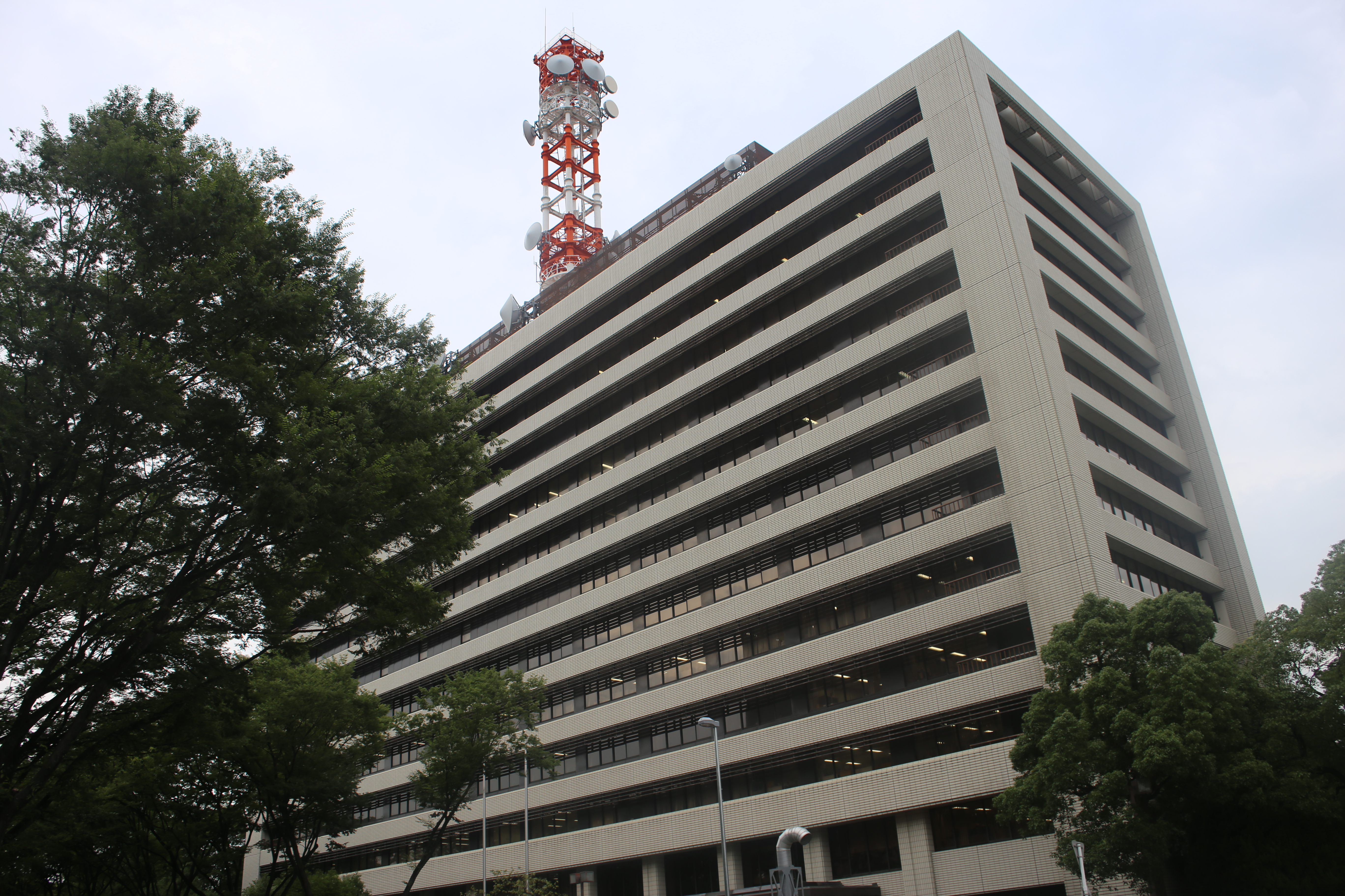 名古屋市中区三の丸二丁目の愛知県自治センターを南側公道西側より撮影